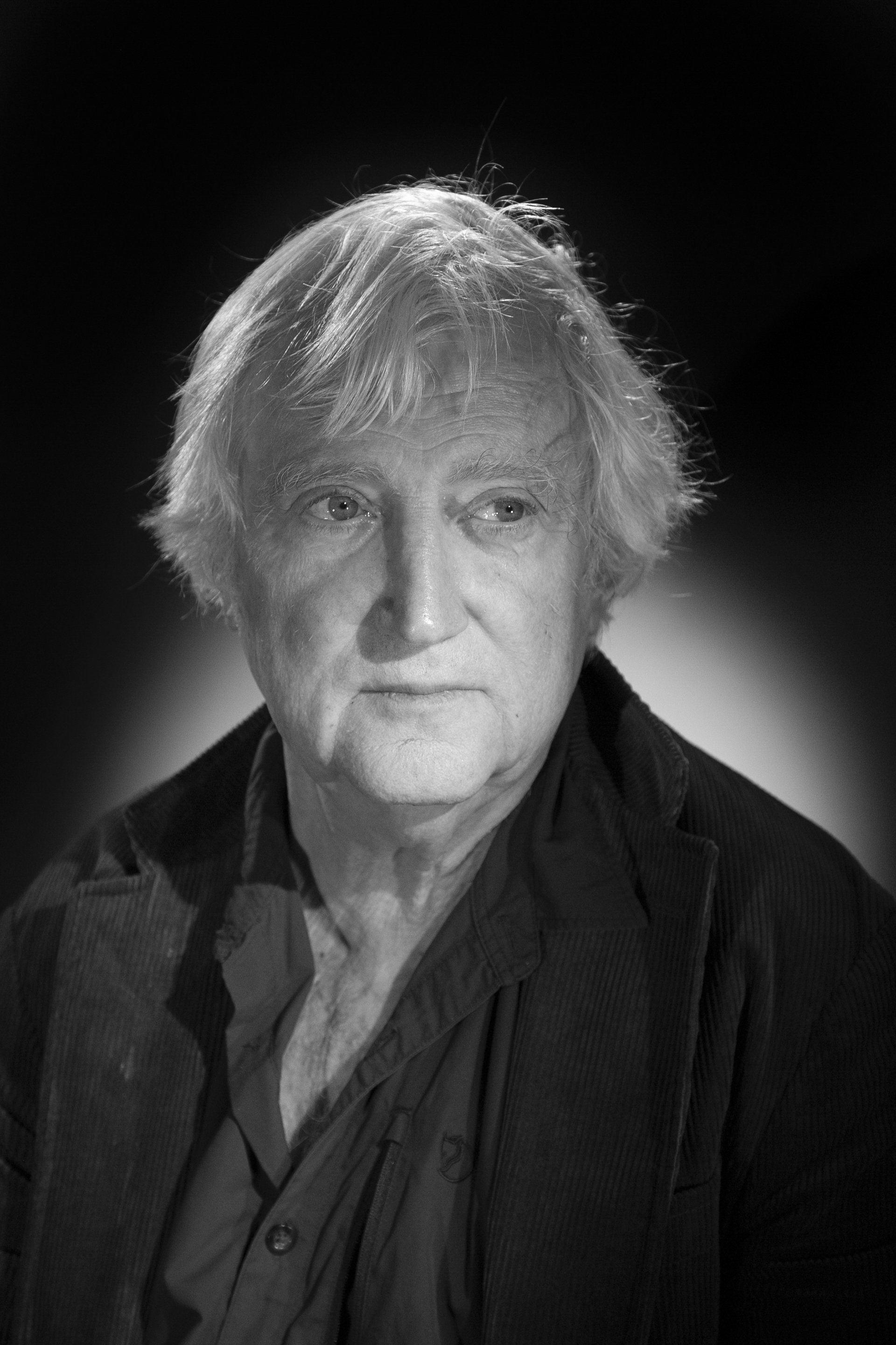 Pierre Pica photographié par Thierry Hugon à l'occasion du 40 ème anniversaire de la fondation Fyssen